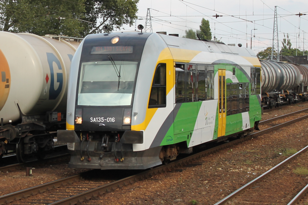 Spalinowy wagon silnikowy SA135-016 w okolicach stacji Kutno. This photo was taken during Railway Wikiexpedition 2014 set up by Wikimedia Polska Association in cooperation with Fundacja Grupy PKP.You can see all photographs in category Wikiekspedycja kolejowa 2014.